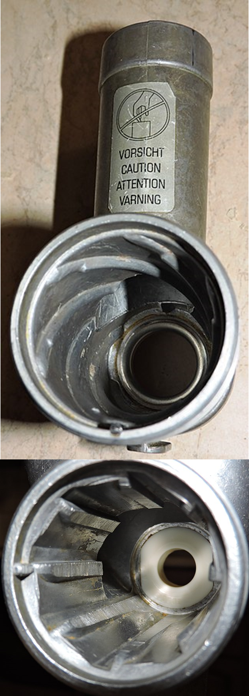 Внутренняя часть электрической (вверху) и ручной (внизу) мясорубок содержат режущие рёбра